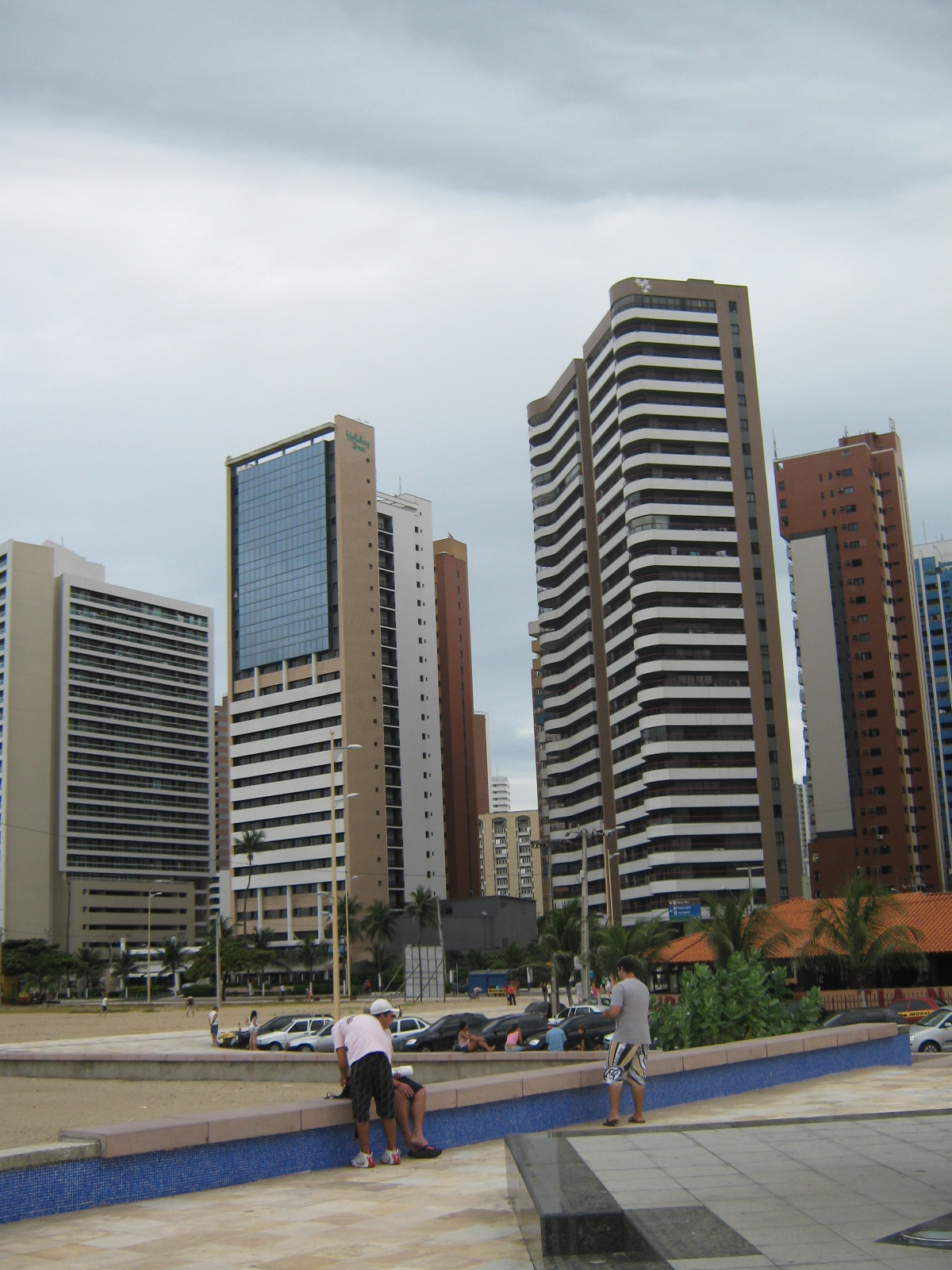 Iracema Beach, Fortaleza, Brazil